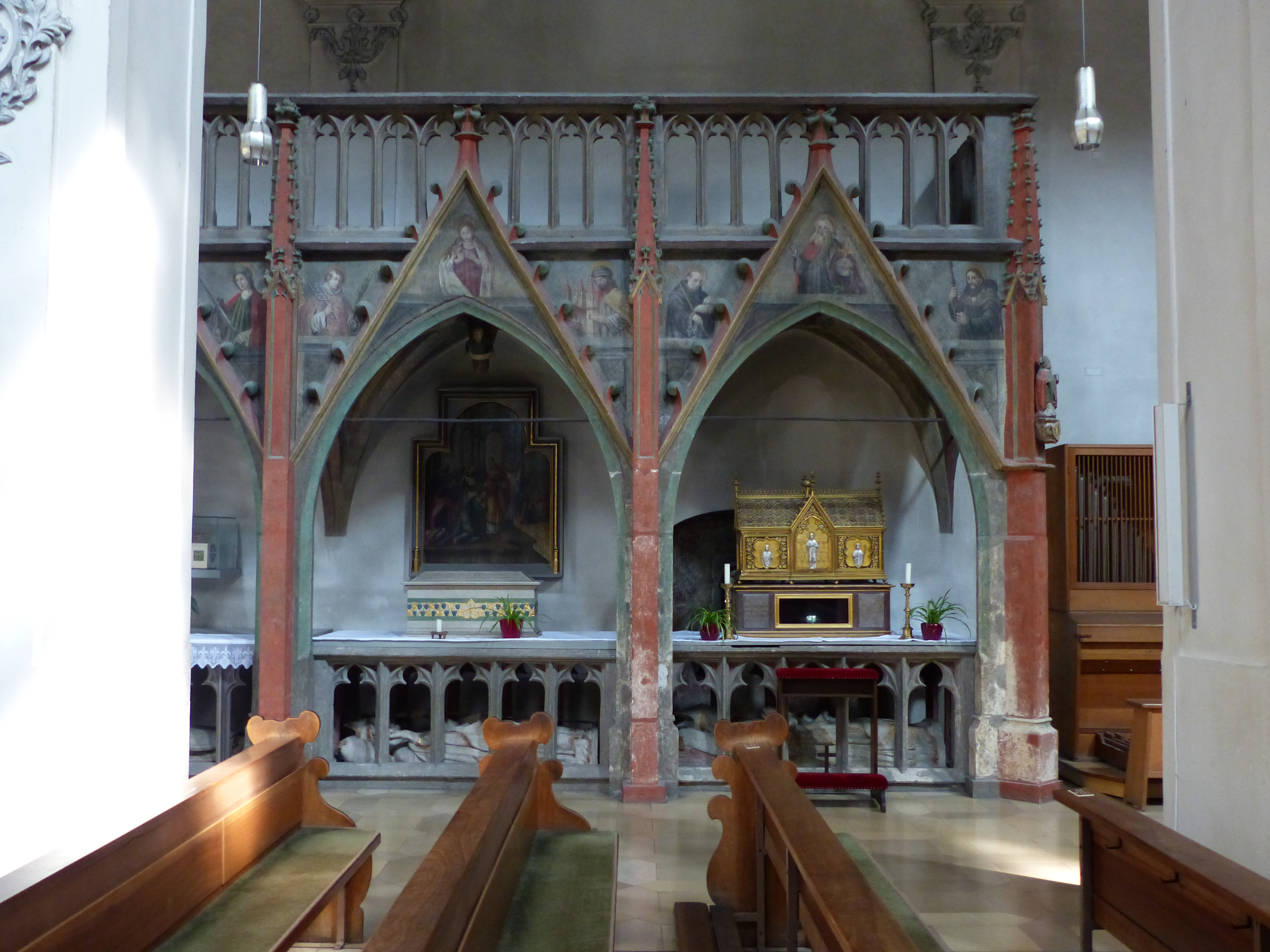 Niedermünsterkirche in RegensburgThis is a photograph of an architectural monument.